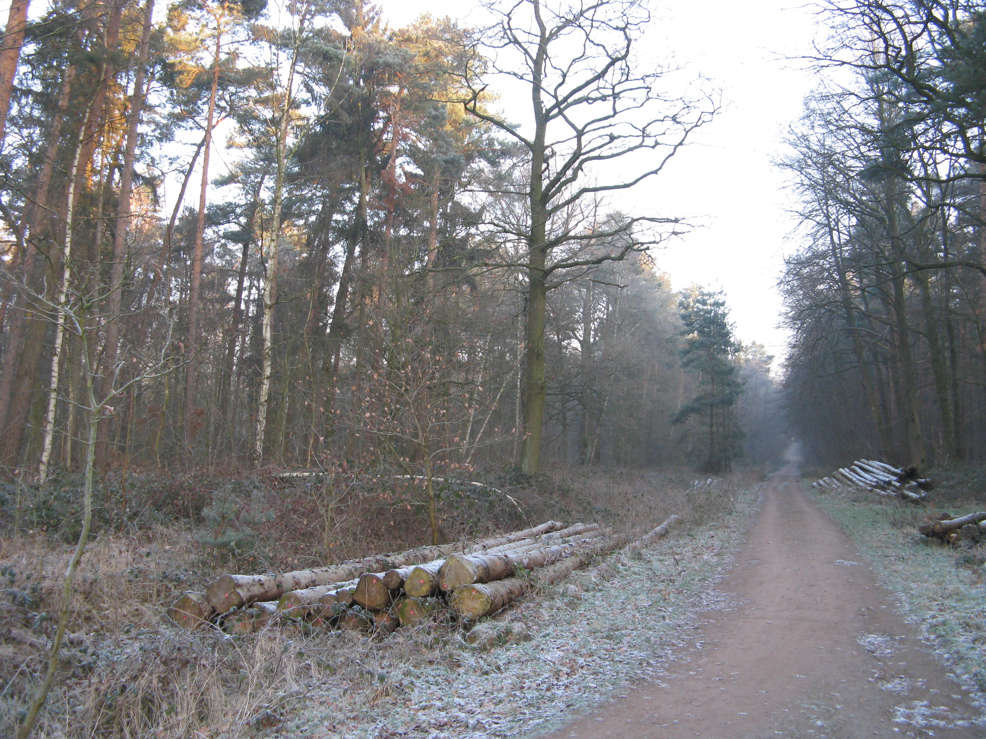 Im NSG Heisterholz in NRW